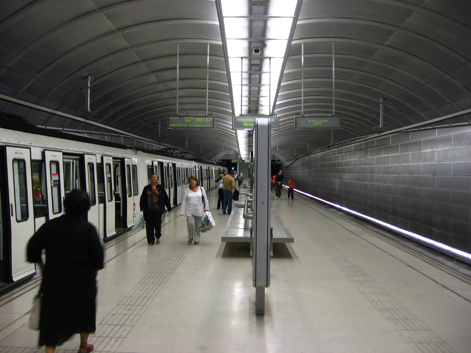 Platform of Canyelles station, Barcelona Metro/Andana de l'estació Canyelles, Barcelona